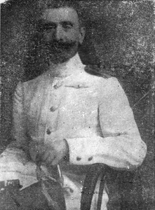 Йоанис Аврасоглу